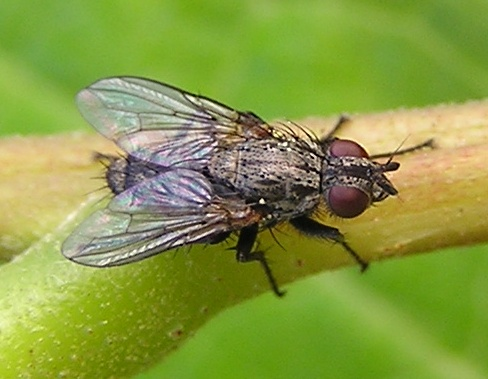 Freudenfeldia rubricosa in einem Garten in der Nähe von Neuss (Deutschland).